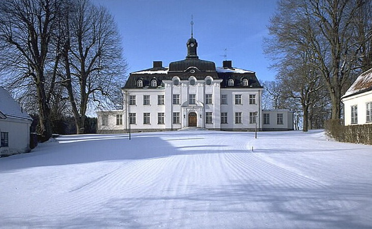 Motiv: Skeppsta Nyckelord: Riksintressen, Vintermotiv Kategori: Bruksherrgård Skeppsta